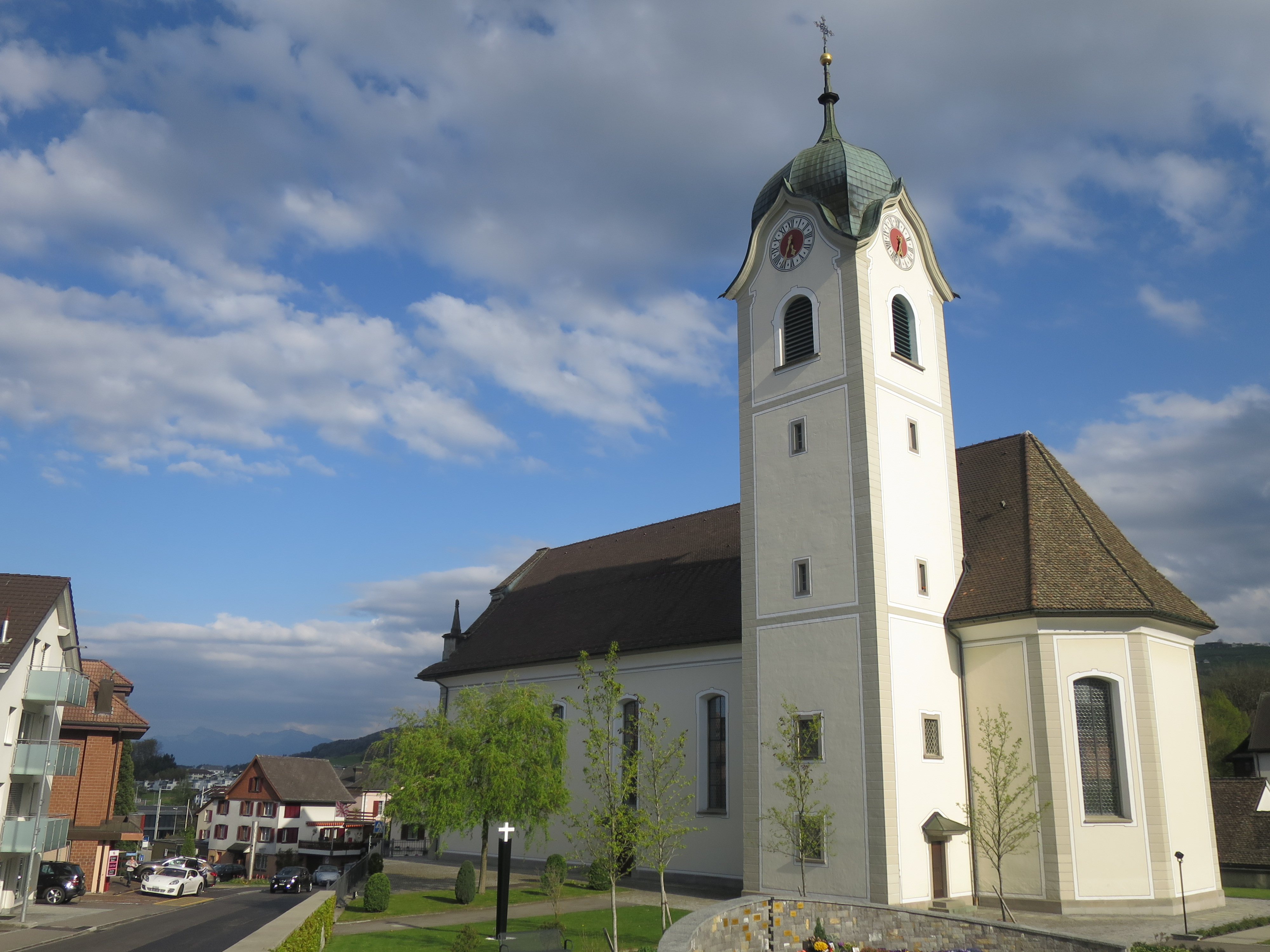 Aussenansicht der Kirche St. Verena, Wollerau (1781–1787)